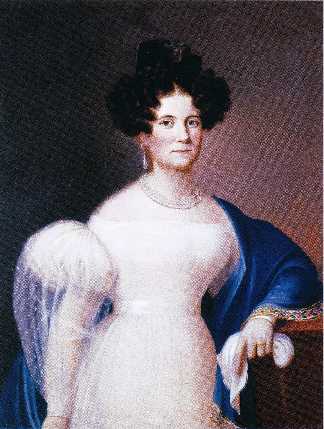 Ottiliana Sofia Wärnhjelm, o.s. Adlercreutz (1785–1829), maaherra Herman Henrik Wärnhjelmin puoliso.